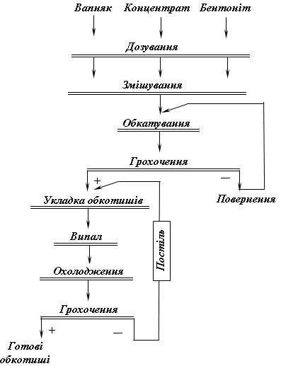 Схема